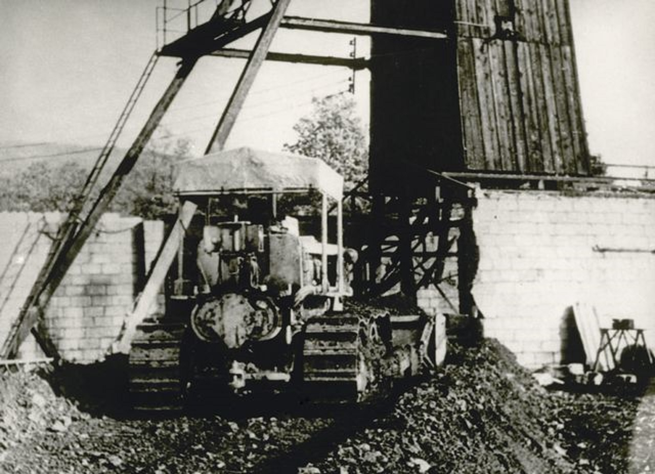 Remblaiement du puits de l'Étançon.